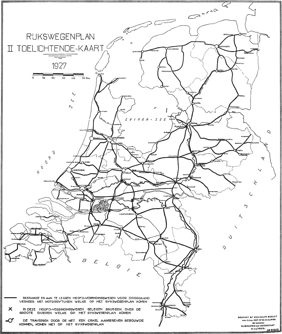 Right Rijkswaterstaat